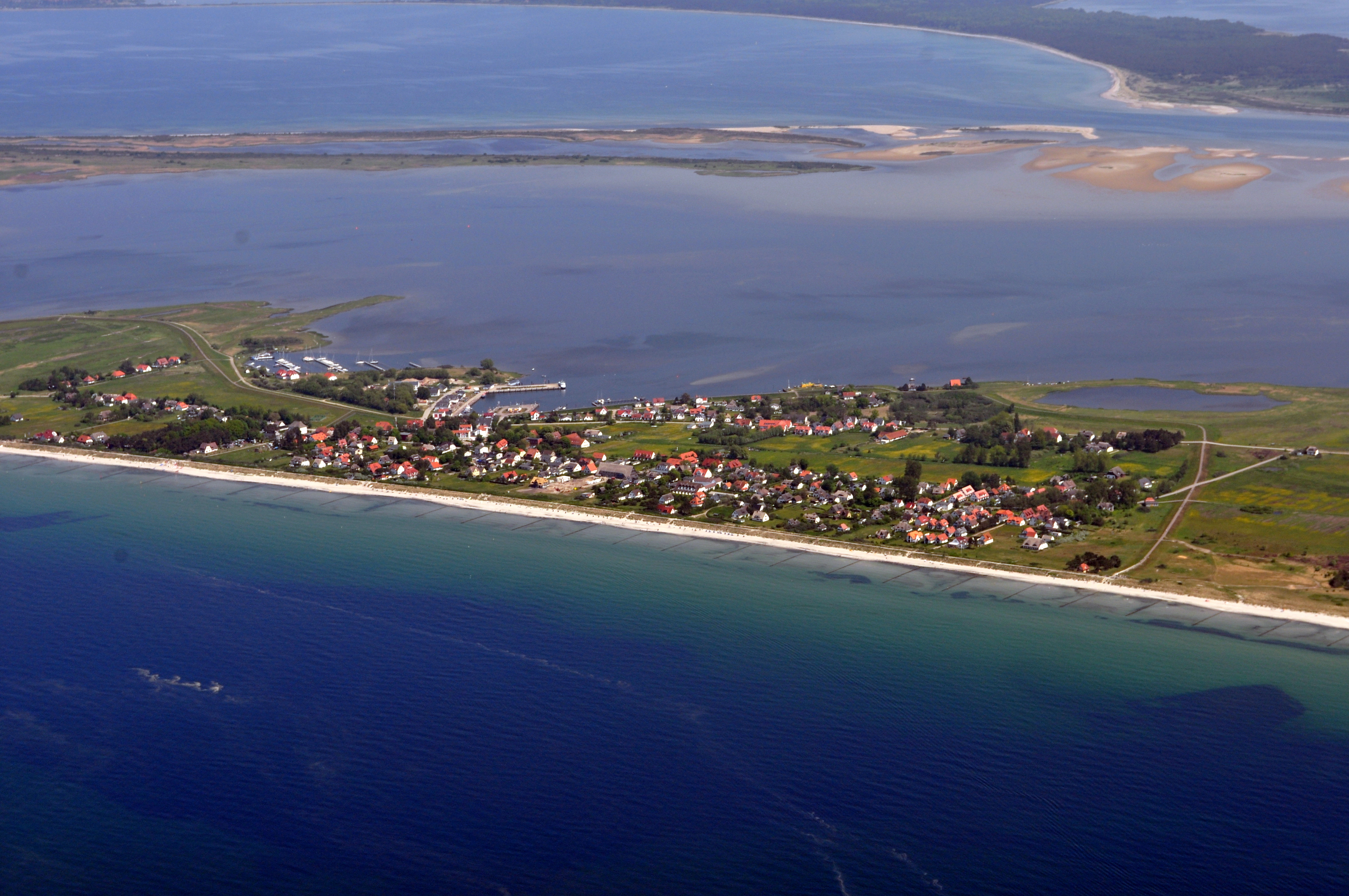 Die Bilder wurden von mir während eines einstündigen Rundflugs ab Flugplatz Güttin am 21. Mai 2011 aufgenommen. Die Bildbeschreibung steht im Dateinamen. Aufgenommen mit einer Nikon D5000 durch das Seitenfenster des Flugzeugs.